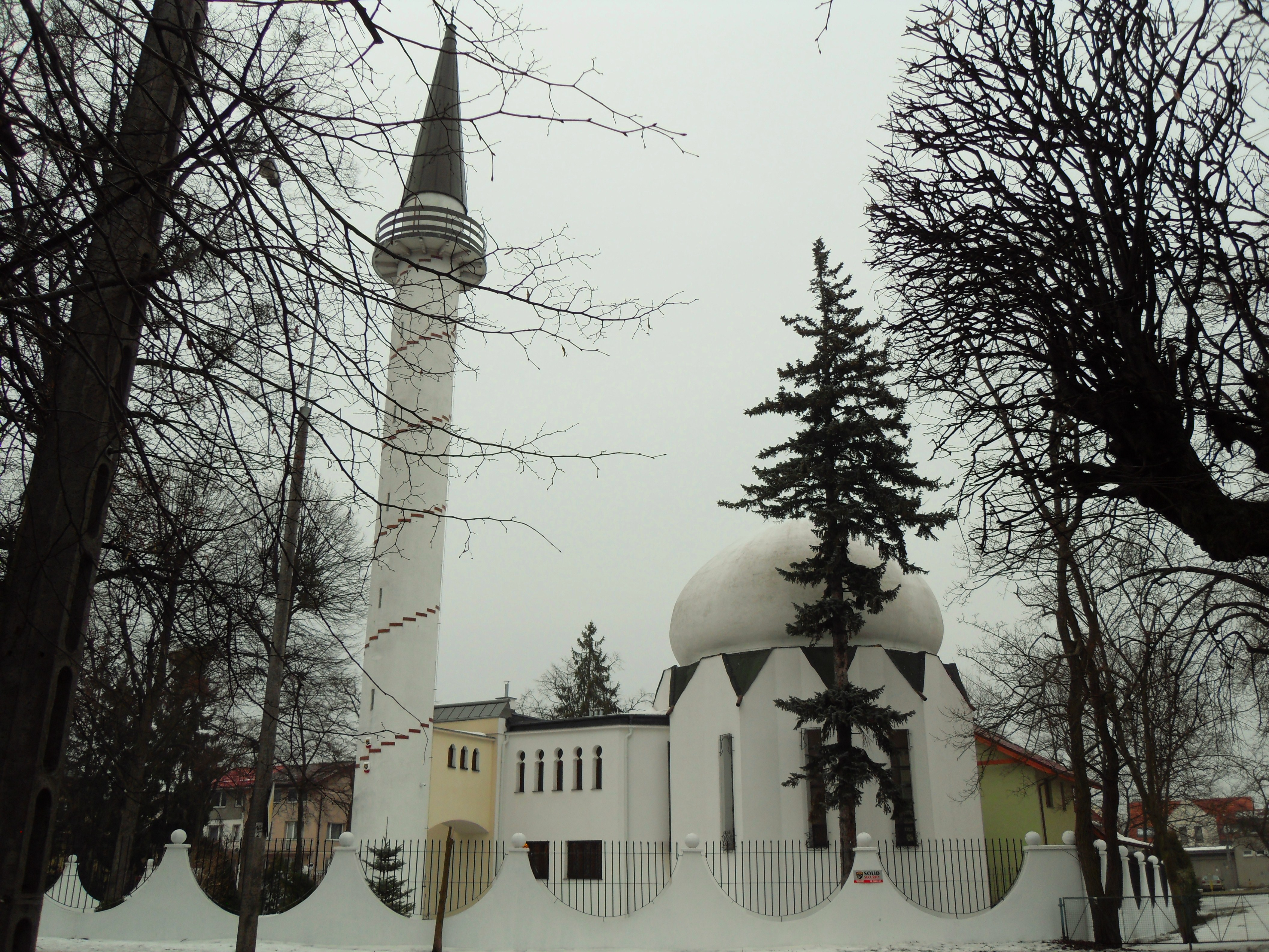 Meczet w Gdańsku.